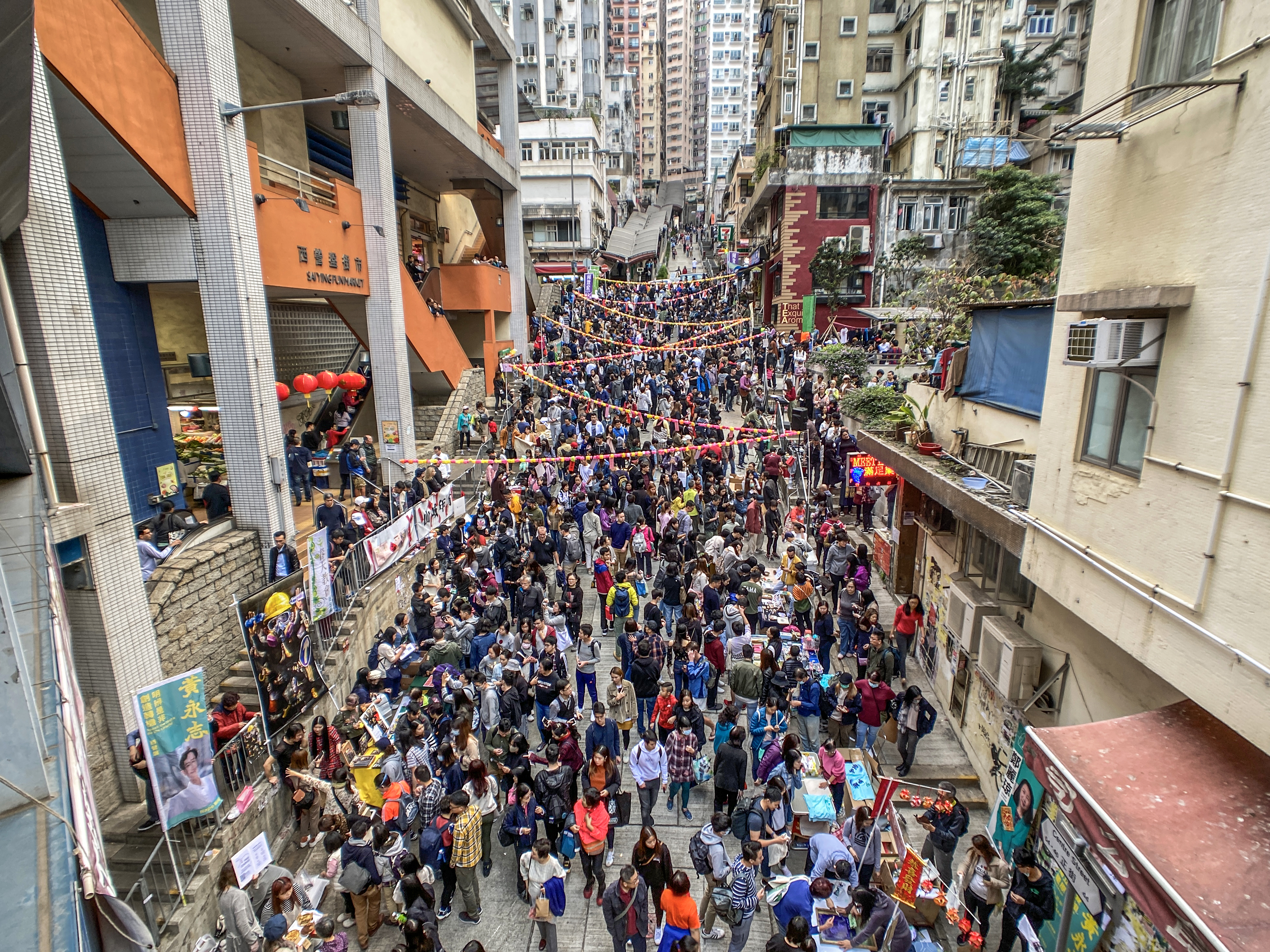 西營盤山城和你宵